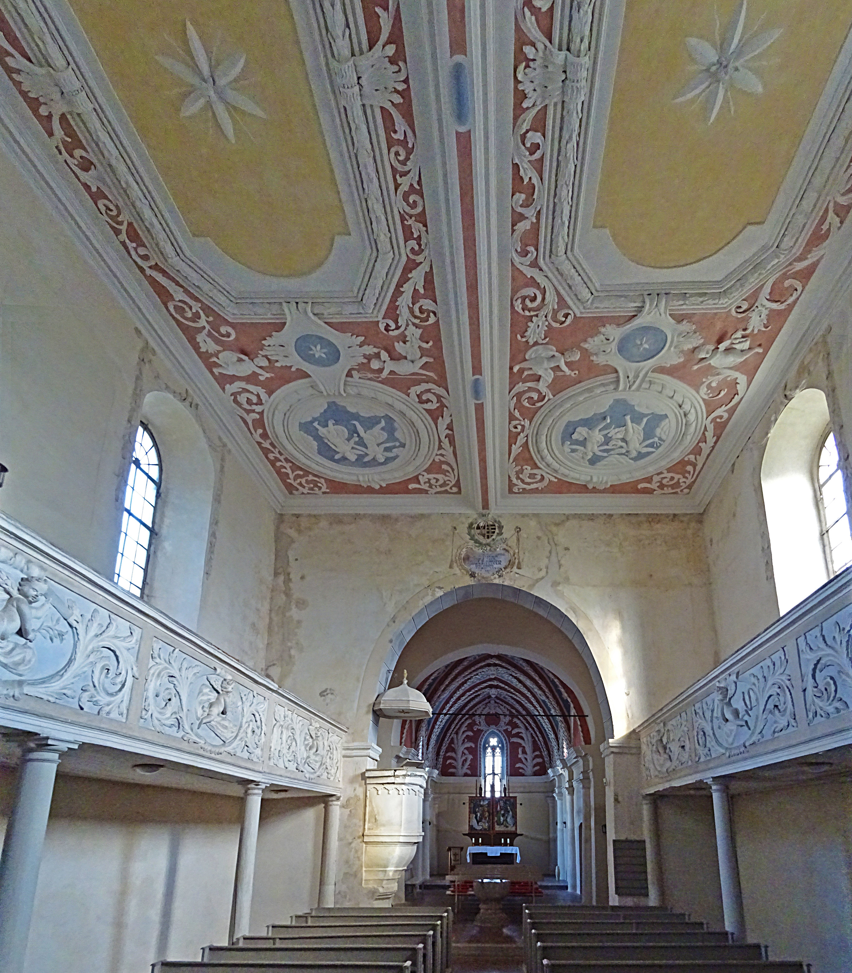 Innenraum der Kirche St. Simon und Juda (Neunhofen)